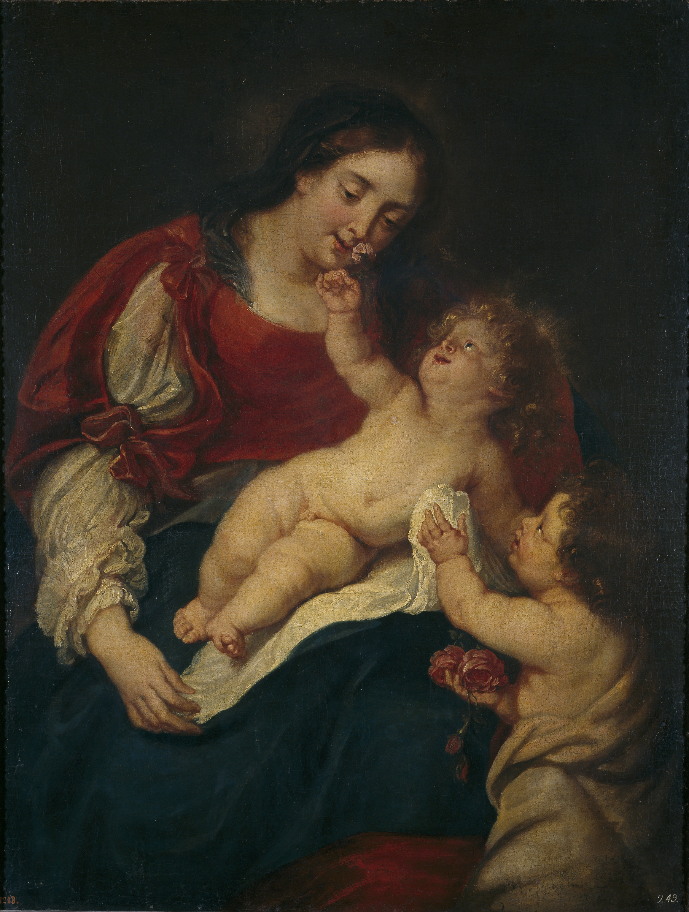 La Virgen de las rosaslabel QS:Les,"La Virgen de las rosas"